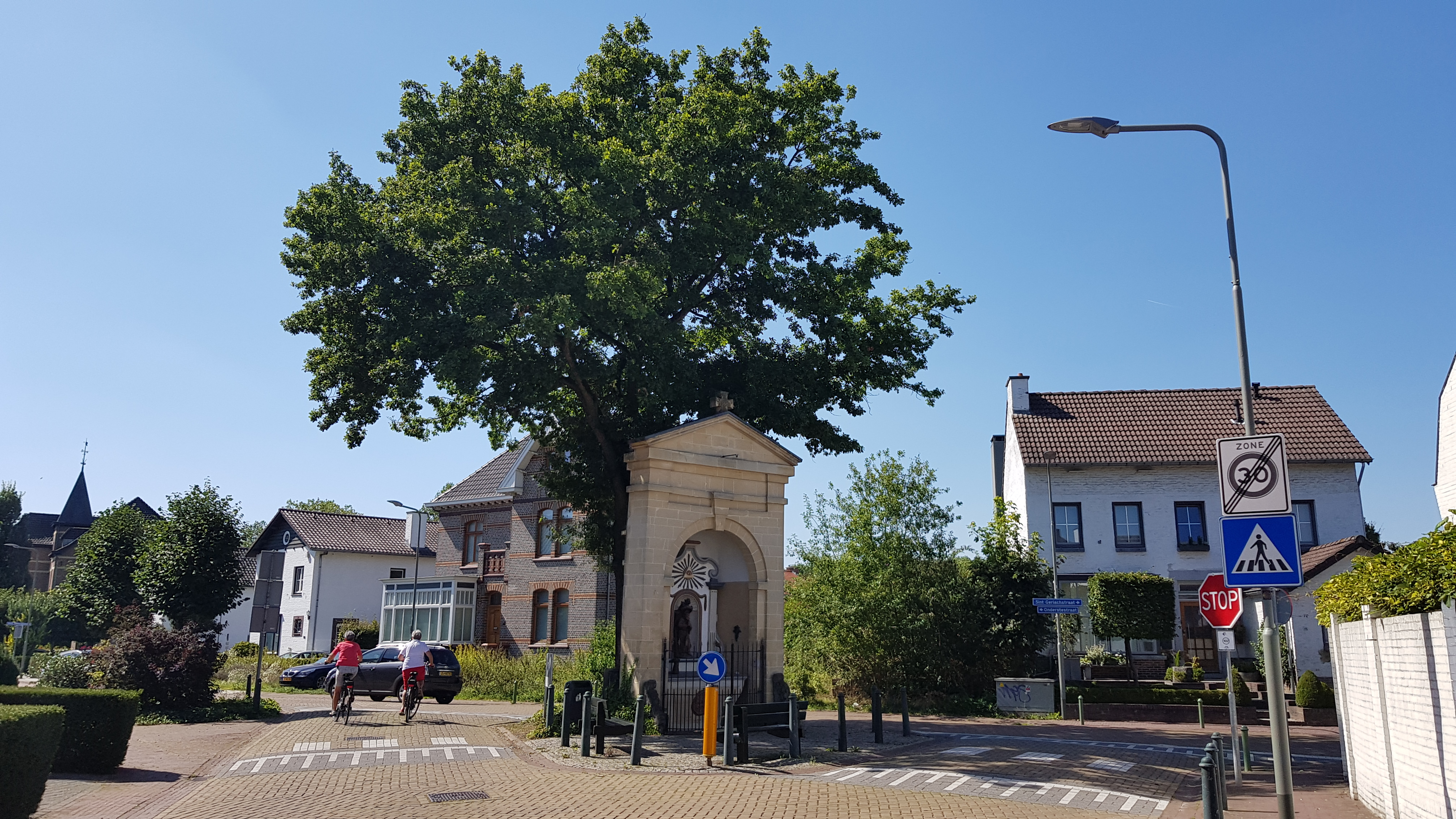 Gerlachuskapel, Houthem, Limburg, Nederland